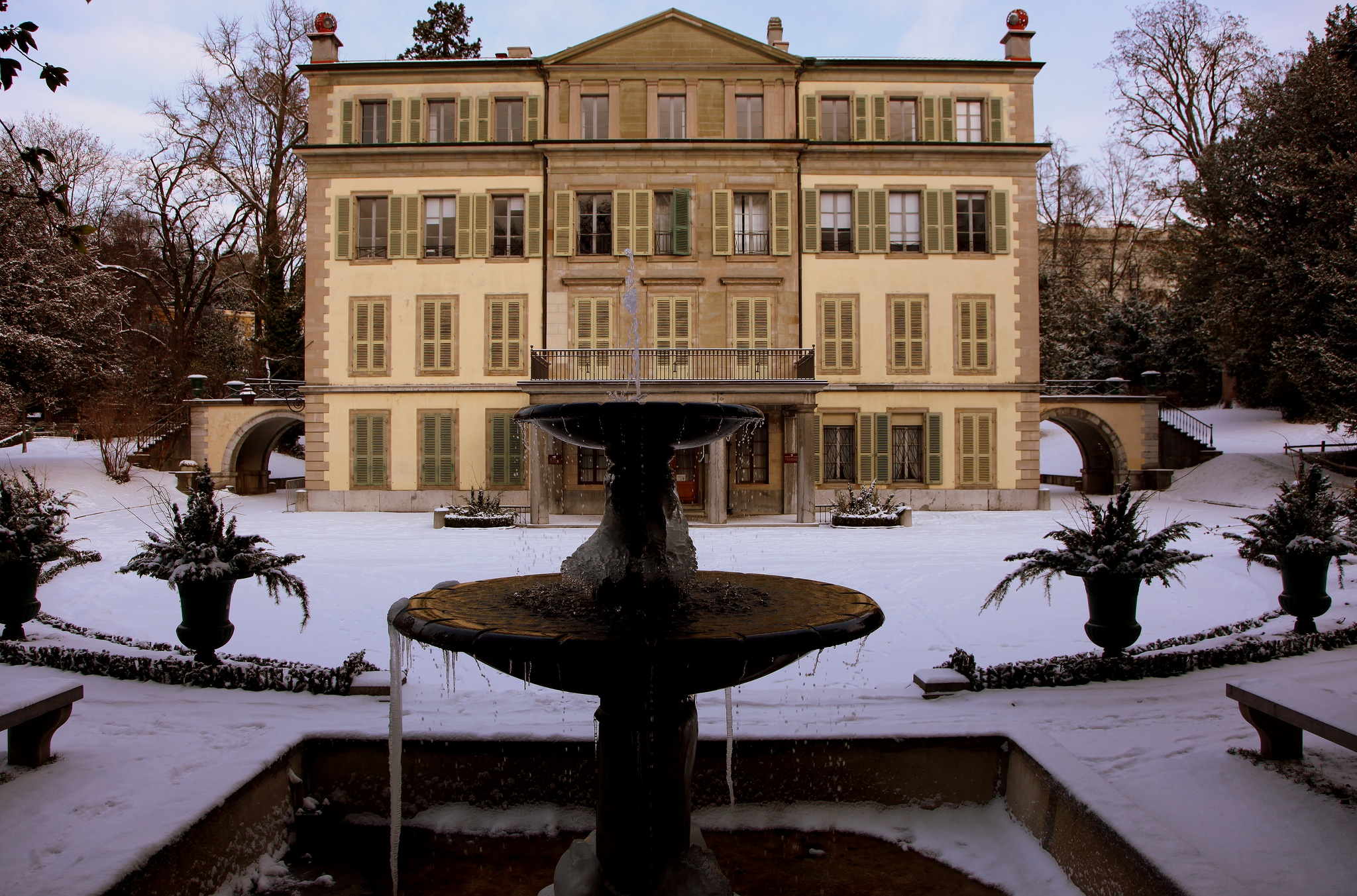 Photo pour concours wikilovesmonuments.ch. Villa Mon-Repos in Lausanne, Switzerland. Completed 1774, see here.